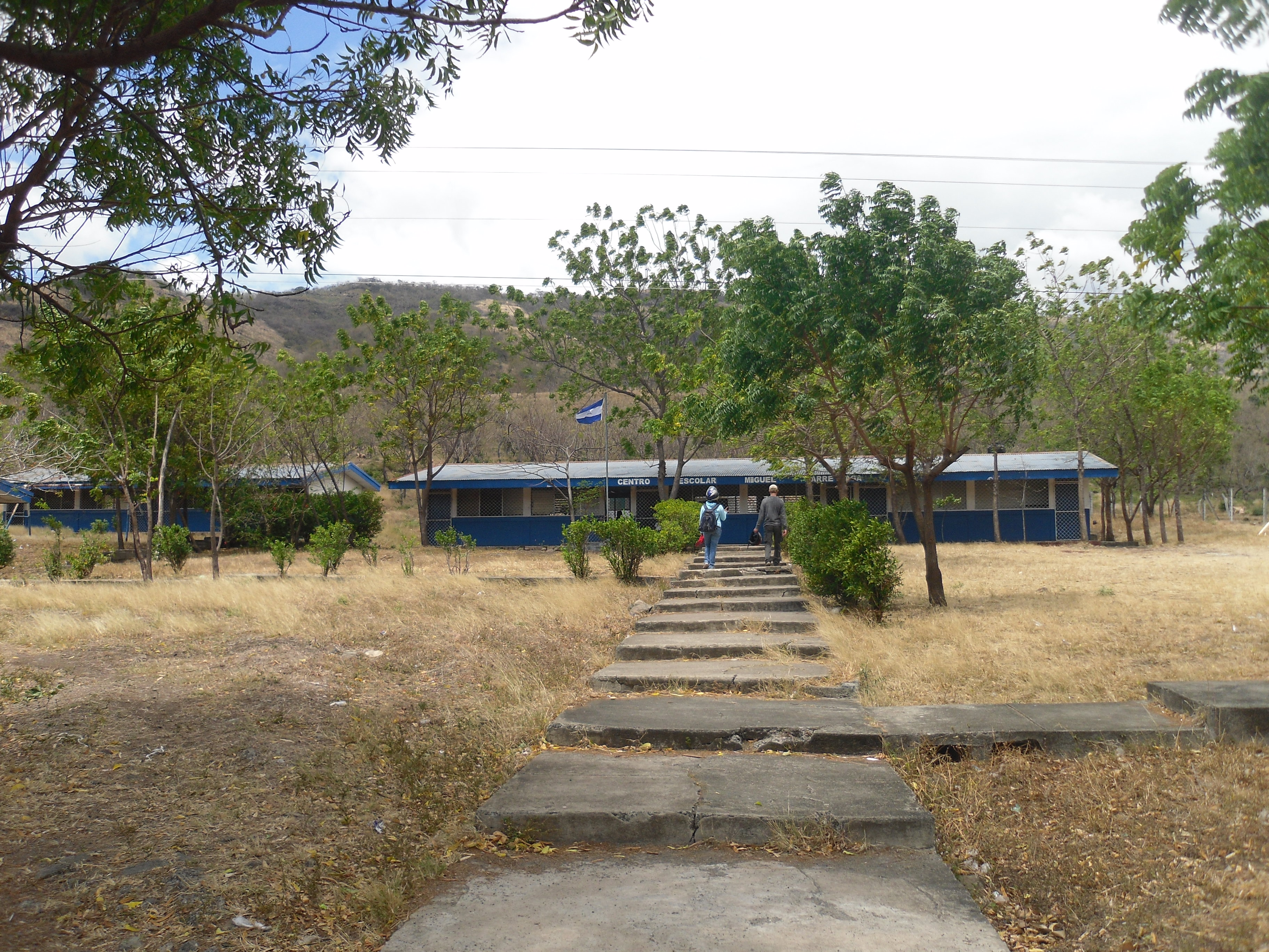 Escuela Miguel Larrynaga, San Lorenzo, Nicaragua